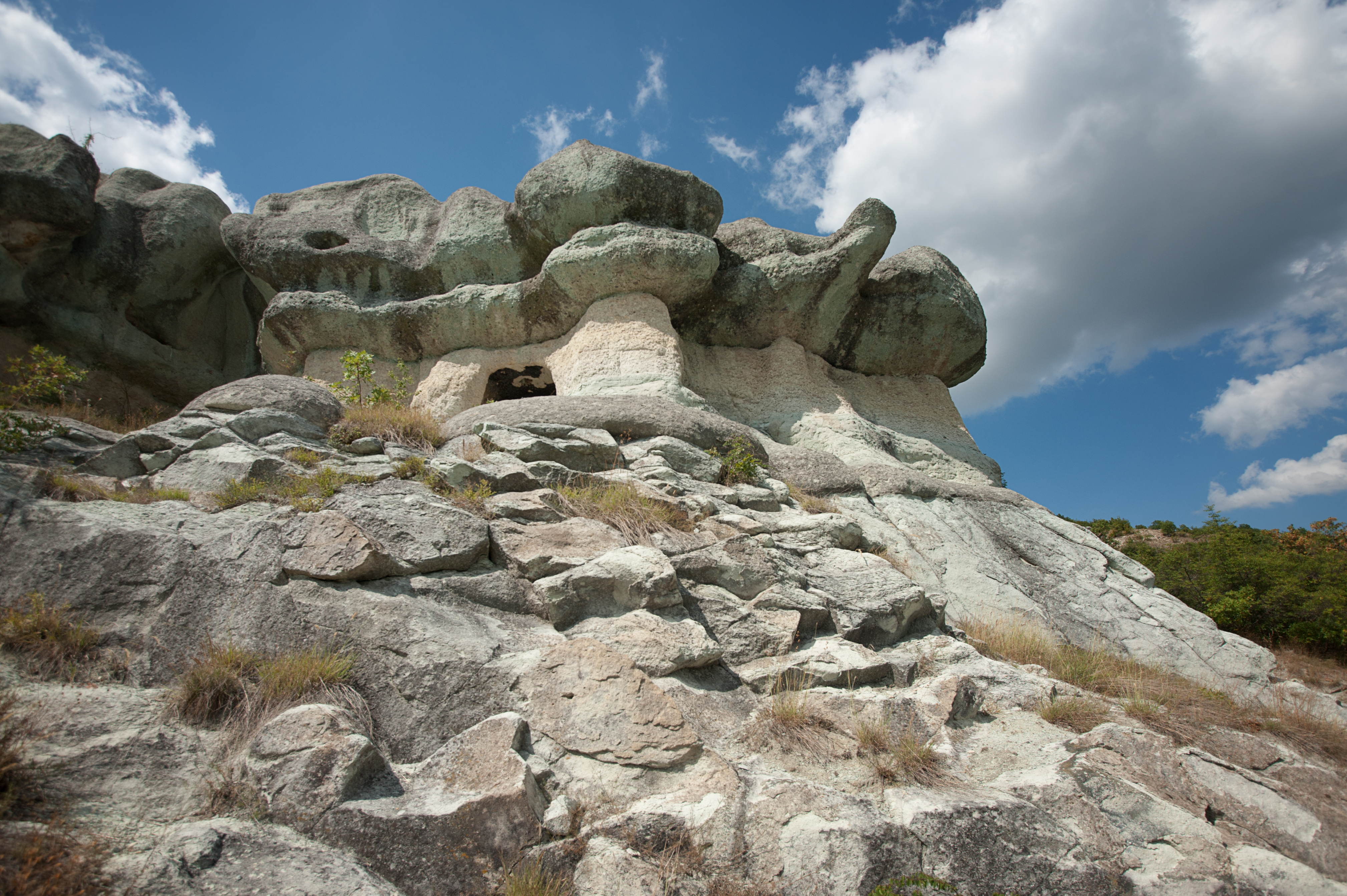 Тракийски скални гробници в м.„Ак кая”, с.Пчелари